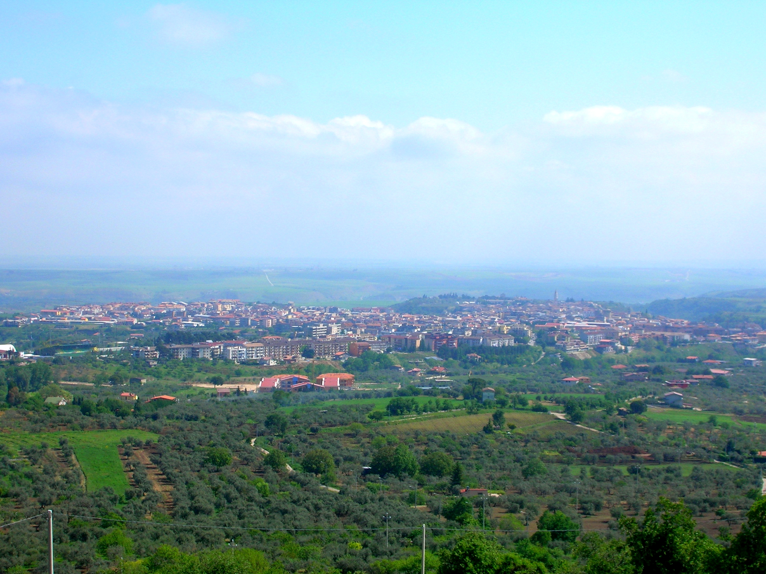 Veduta panoramica di Venosa (PZ)